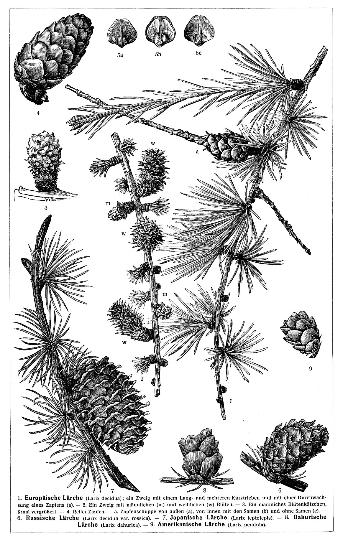 Auszug aus "Meyers Großem Konversationslexikon" aus dem Jahre 1905, es wird neben der Europäischen auch die amerikanisch, japanische, dahurische und russische Lärche dargestellt